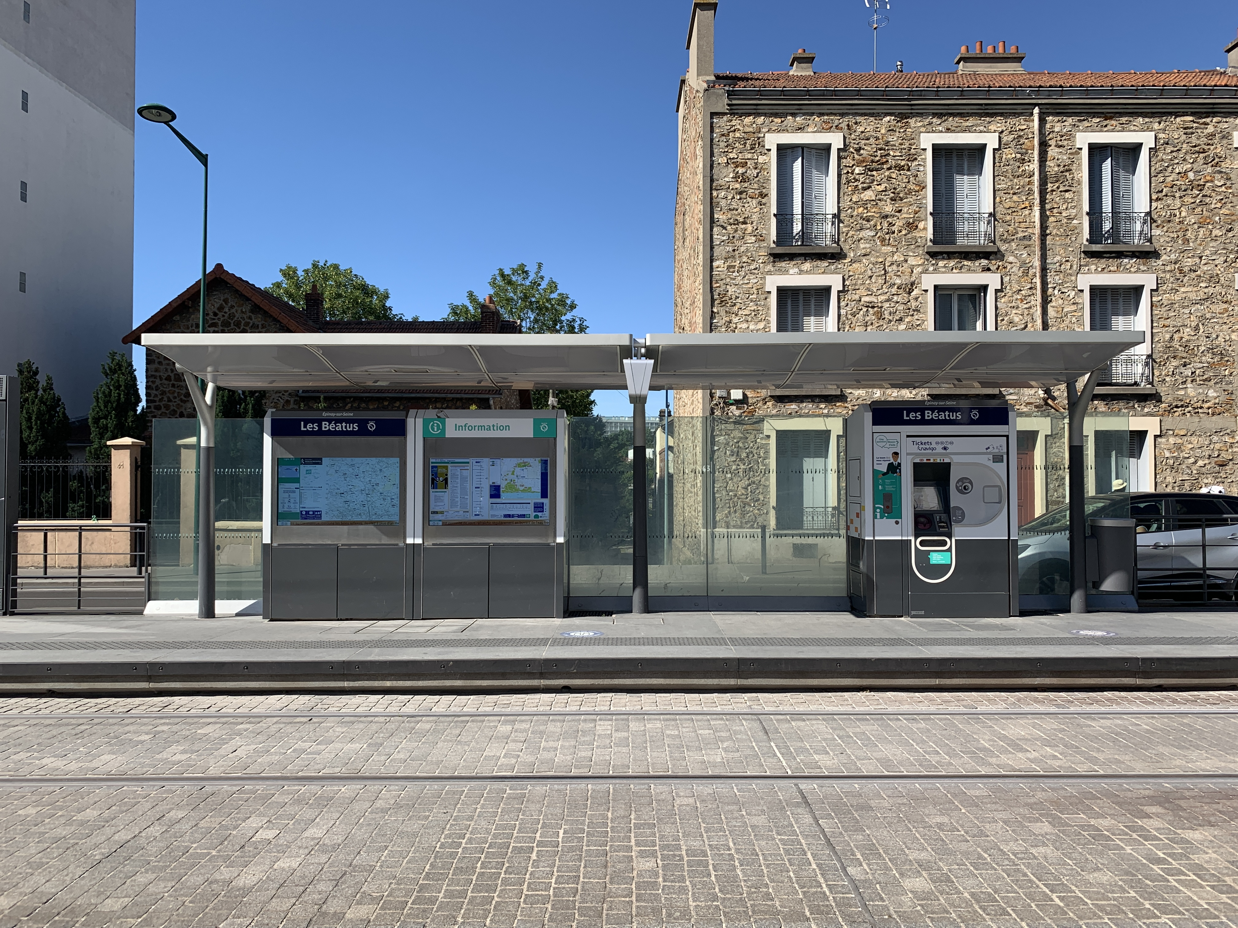 Station de tramway Les Béatus, ligne 8 du tramway d'Île-de-France, Épinay-sur-Seine.